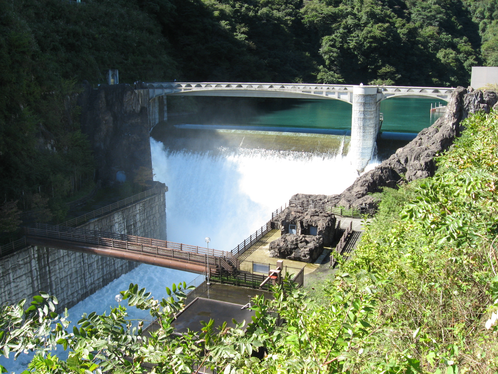 放流中の石小屋ダム